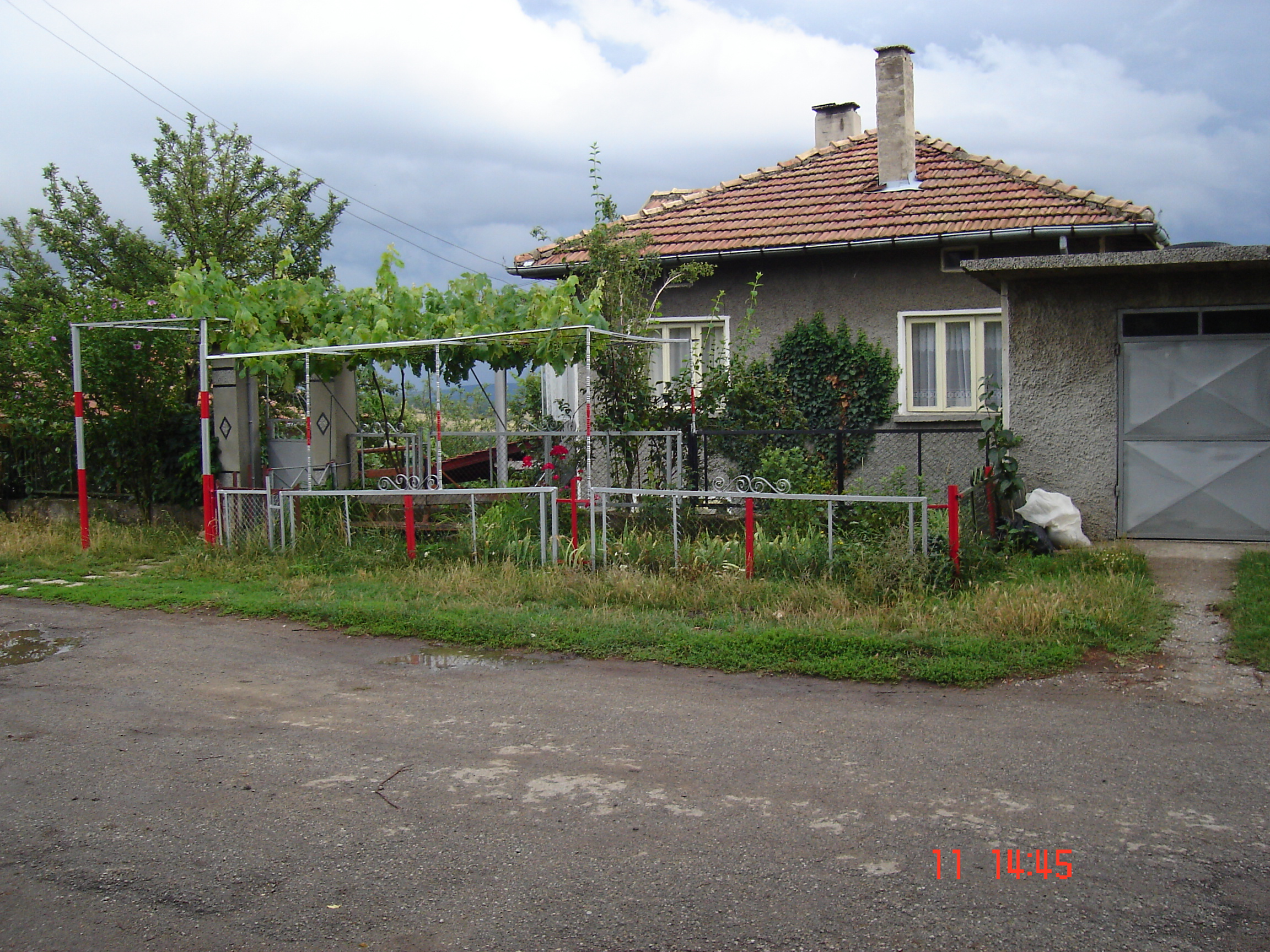 7957 Verentsi, Bulgaria